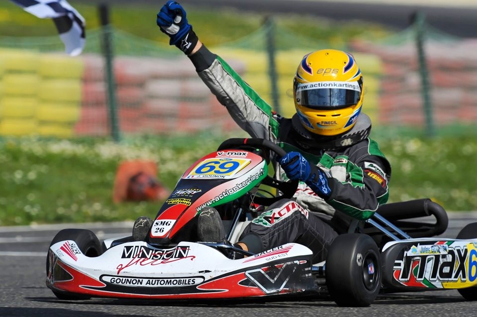 Photographie de Jules Gounon, vainqueur du Trophée Kart Mag Prem's en 2011.